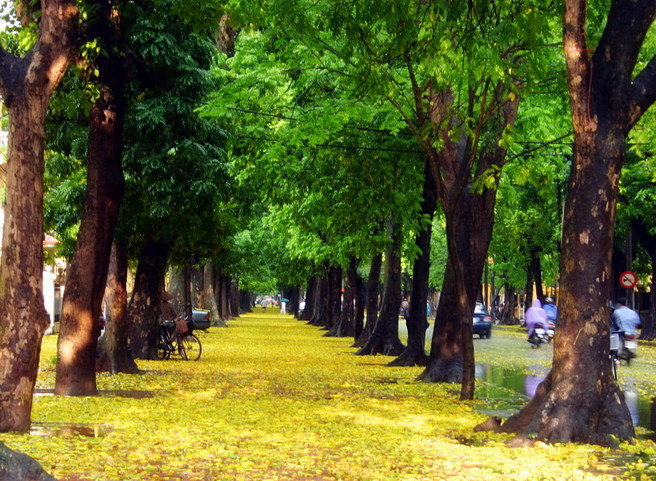 Hanoi - La rue Phan Dinh Phung, ex boulevard Carnot.